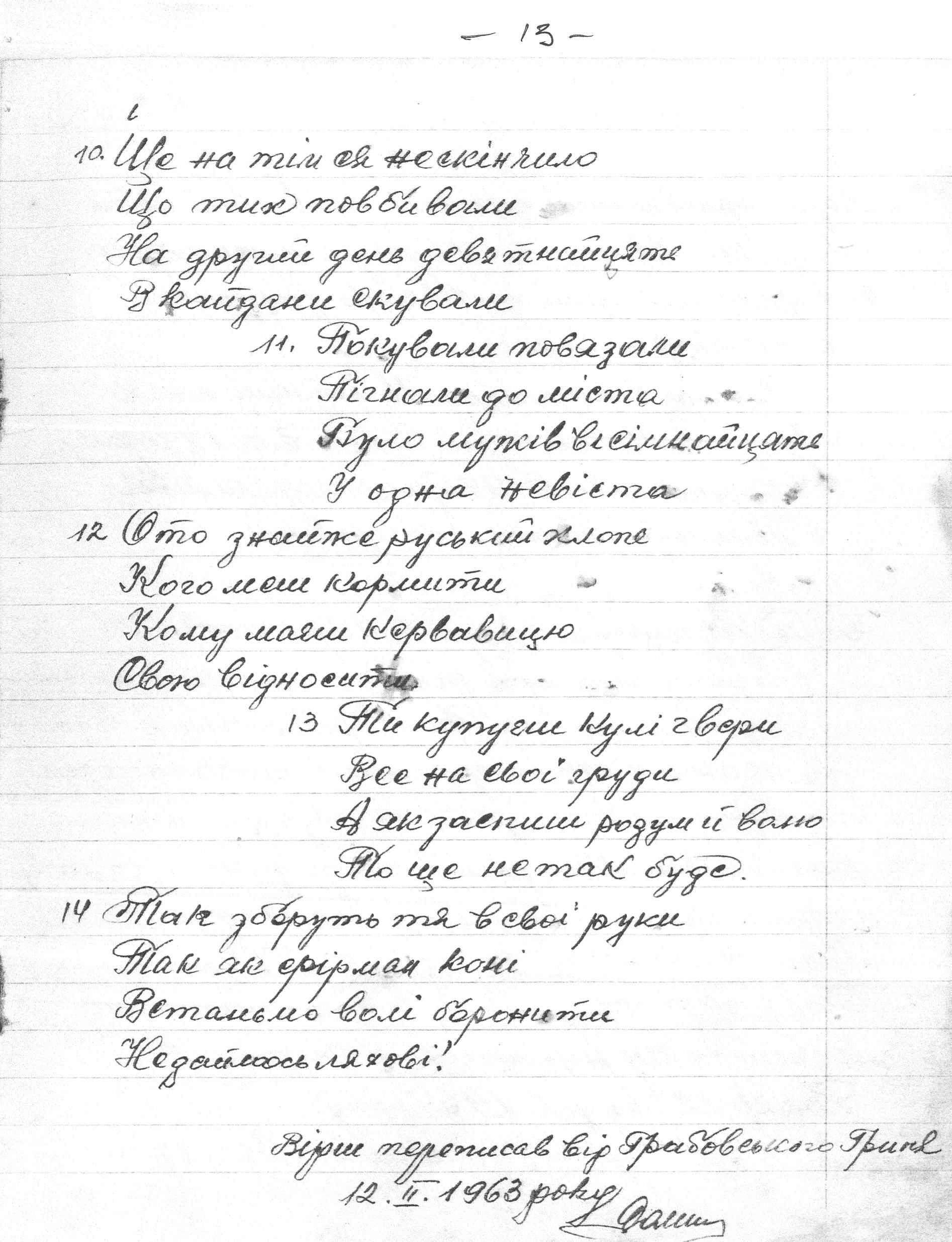 Копія рукопису